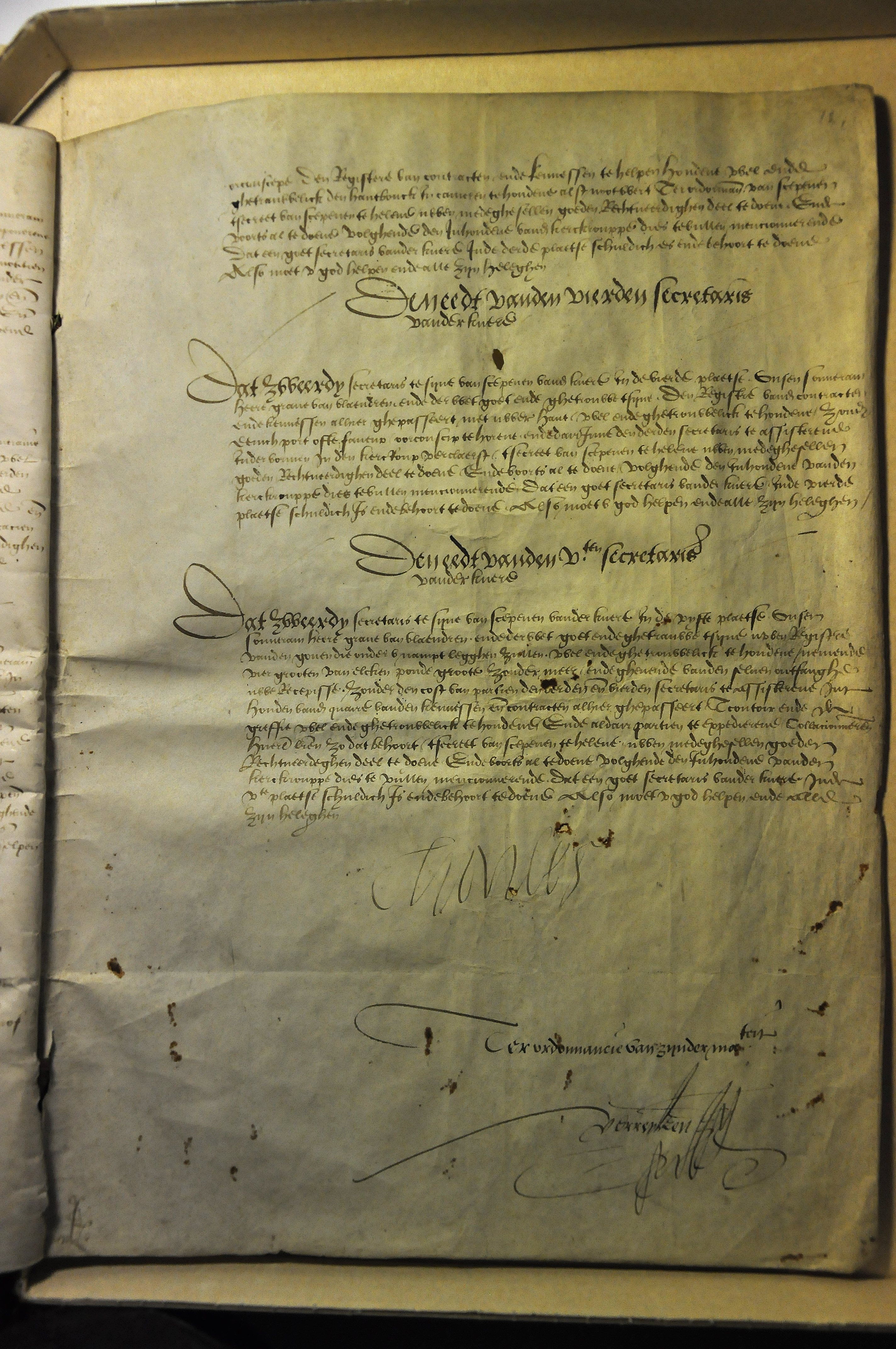 De keure Concessio Carolina uit 1540 waarbij keizer Karel V de vrijheden van de stad Gent beknotte en een aantal maatregelen oplegde, met zijn handtekening - bewaard in De Zwarte Doos te Gent